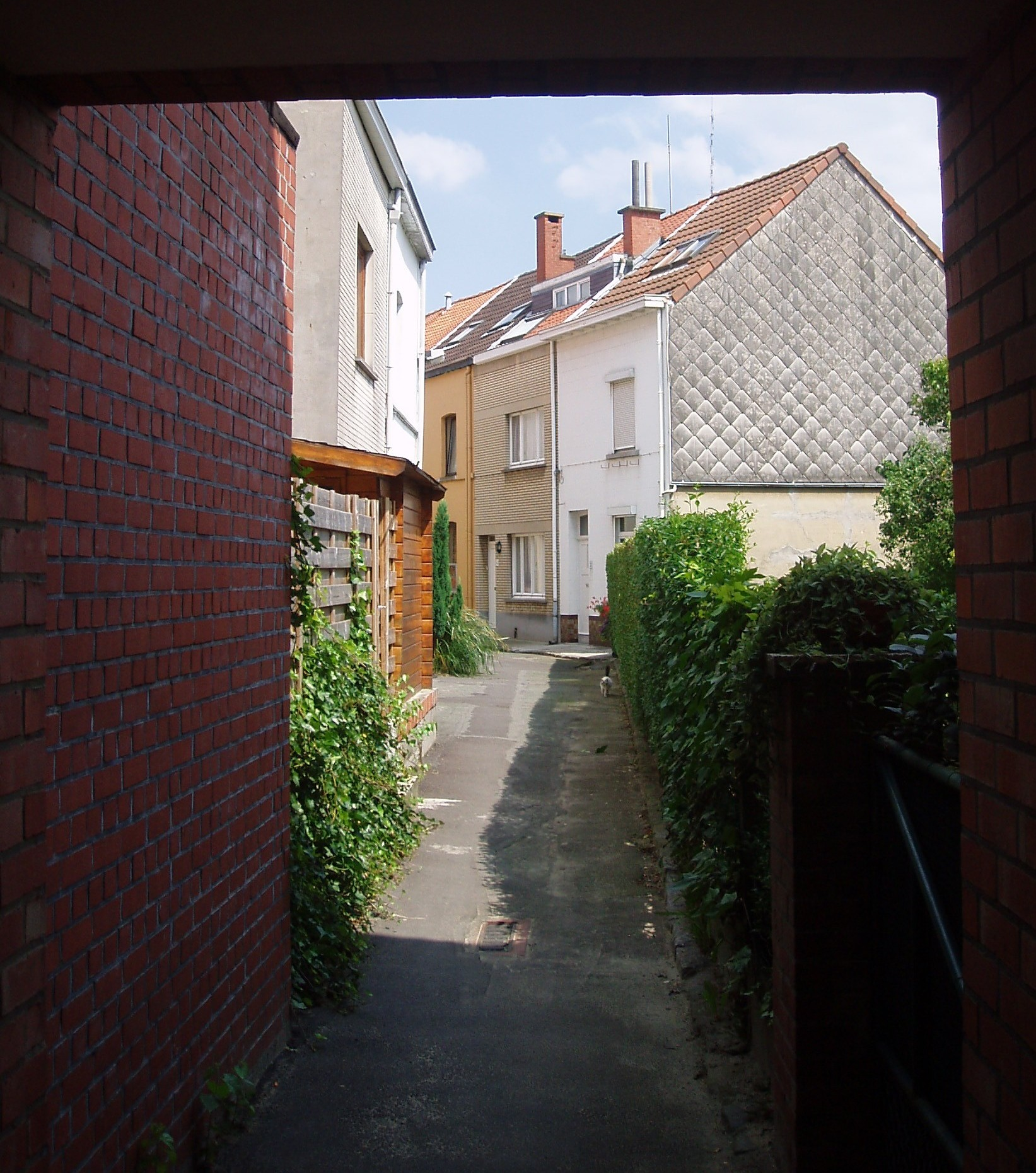 rue de la Piété Auderghem Belgium